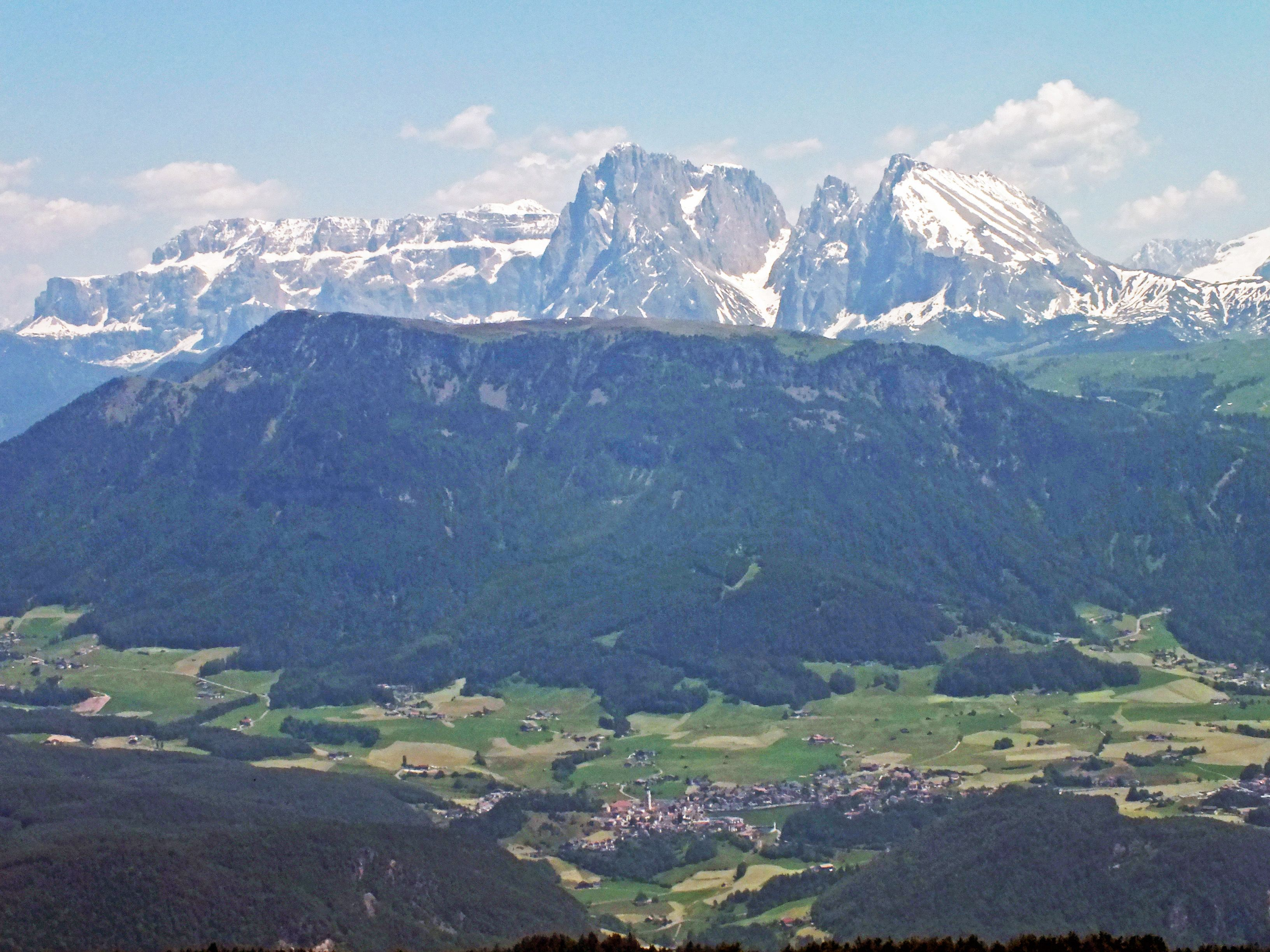 Kastelruth mit Lang- und Plattkofel vom Runden Tisch auf dem Ritten aus gesehen